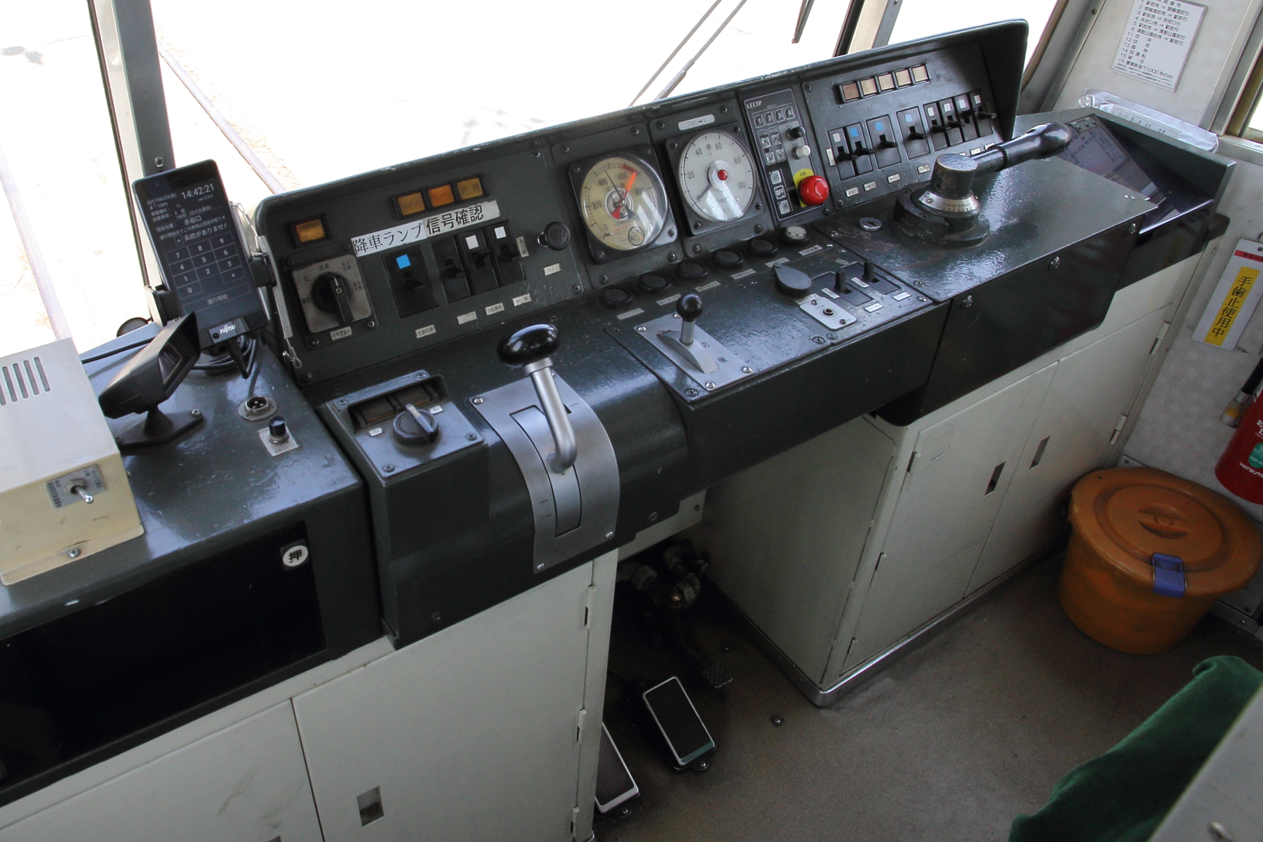 豊橋鉄道モ780形786の運転台